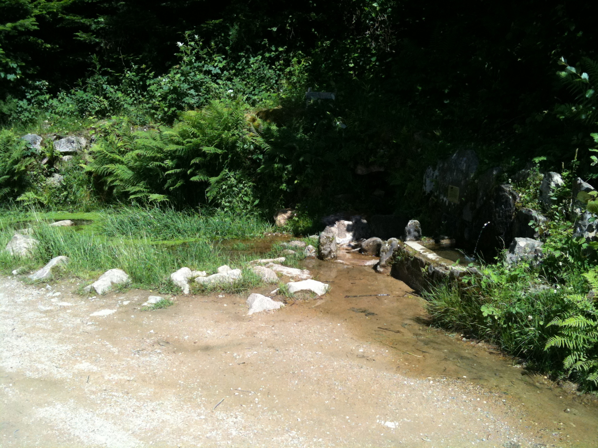 Source de FontFroide à Rivolet au dessus du ruissau Font Froide affluent la rivière de St-Cyr, affluent de l'Azergues